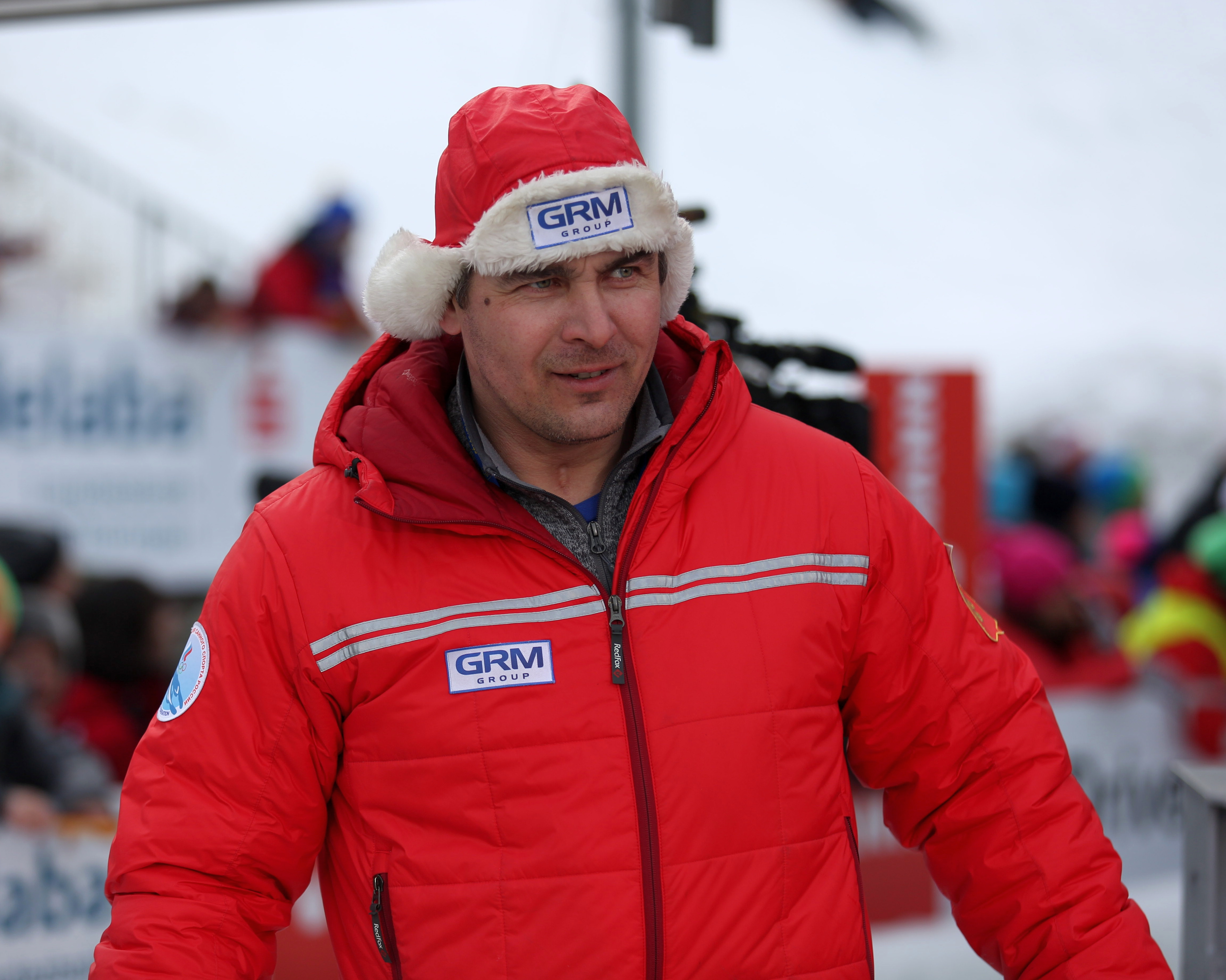 Albert Demchenko beim Rennrodeln-Weltcup der Herren in Oberhof 2017